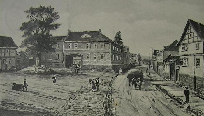 Dorfstraße in Grossgrabe/Thüringen (1909), nach einem Bild von Otto Thomasczek, Künstler aus Mühlhausen in Thüringen.